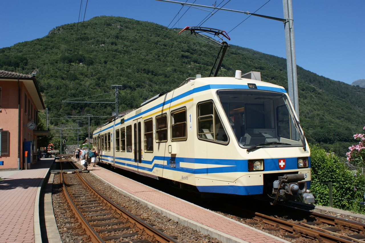 FART ABe 4/6 55 im Bahnhof Intragna.